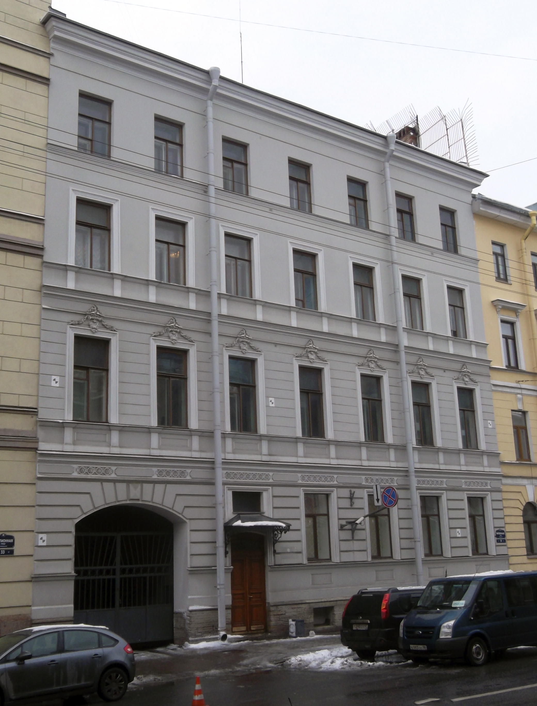 Запасной дом Зимнего дворца (Дом Федосея Скляева или Особняк Менгдена). Флигель на Миллионной, 31